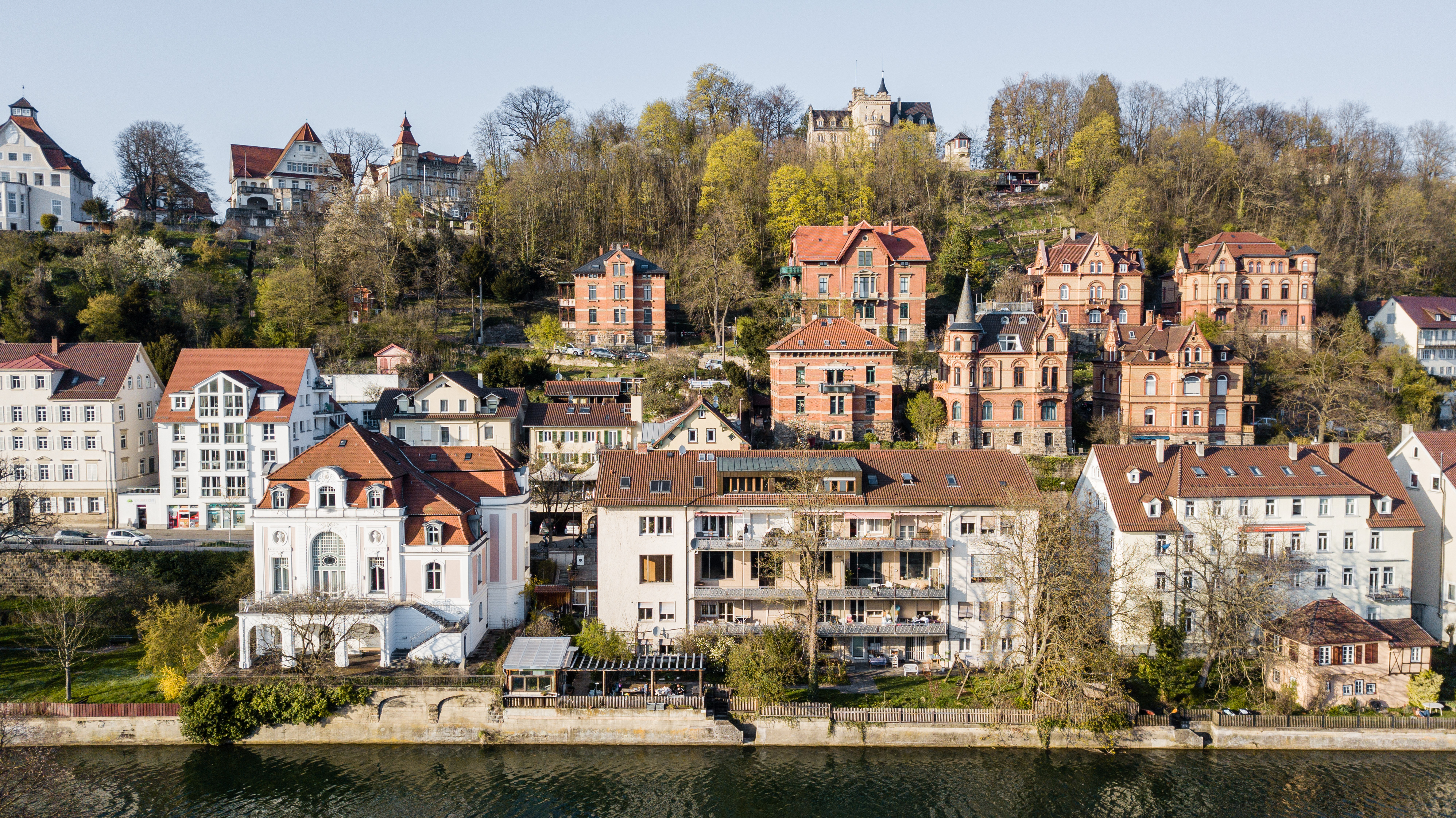 Häuser in der Olgastraße in Tübingen